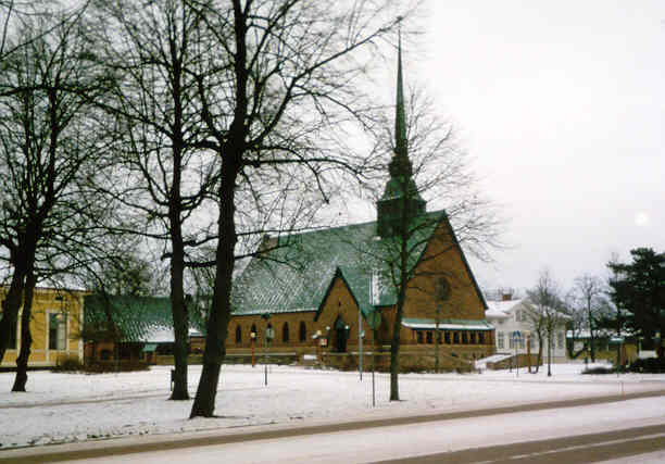 Stadskyrkan i Mariehamn (december 2002), en bild tagen av Harri Blomberg.